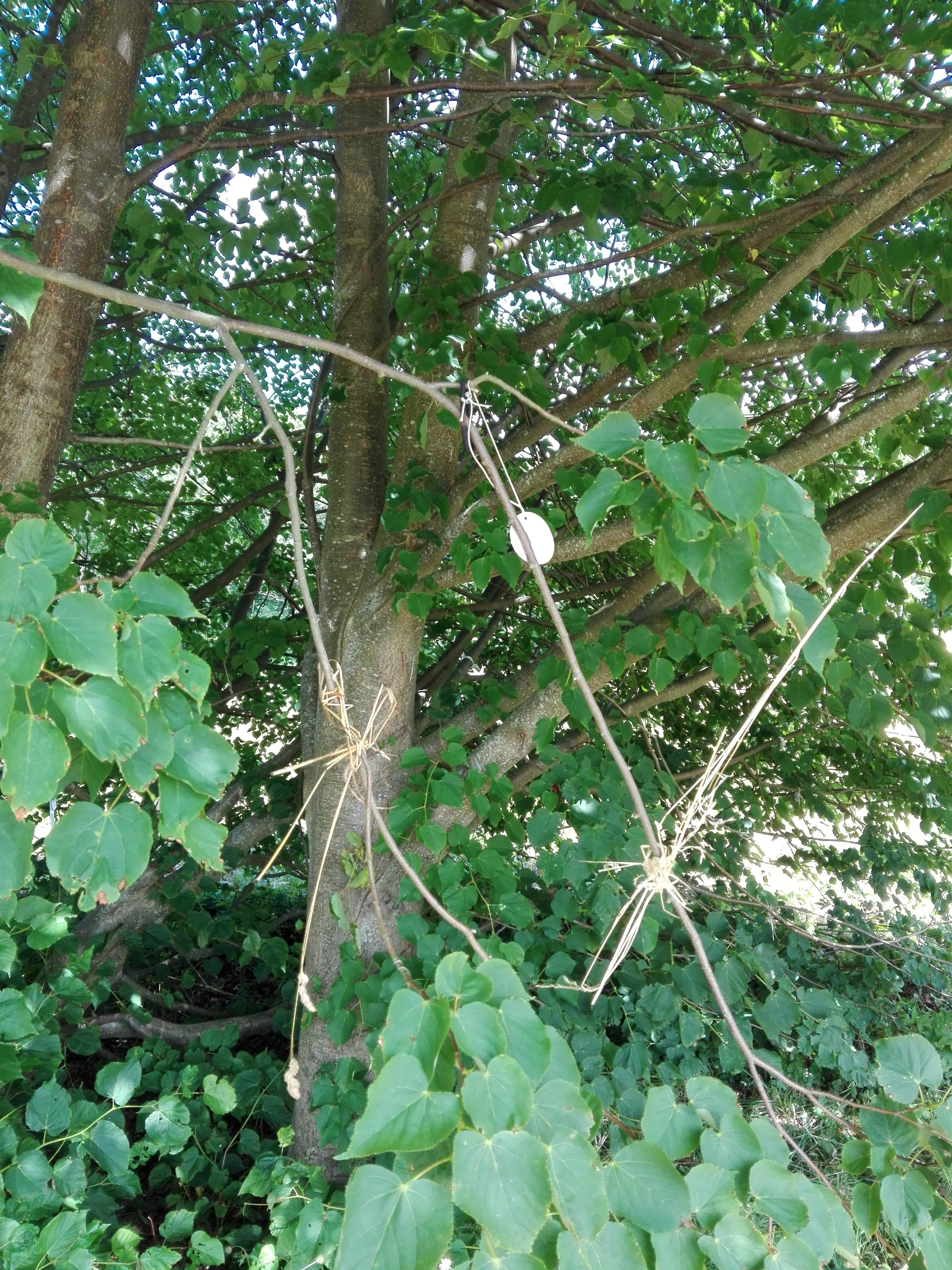 Ülendi ohvripärn Hiiumaal Ülendi külas